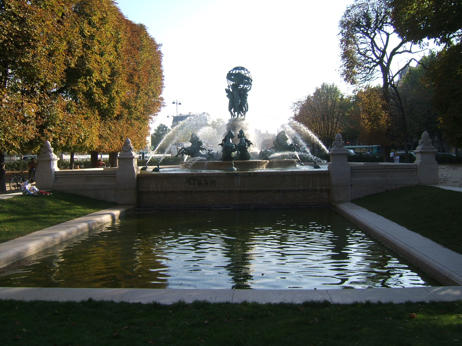 Fontaine des Quatre Parties du Monde (Paris, France)